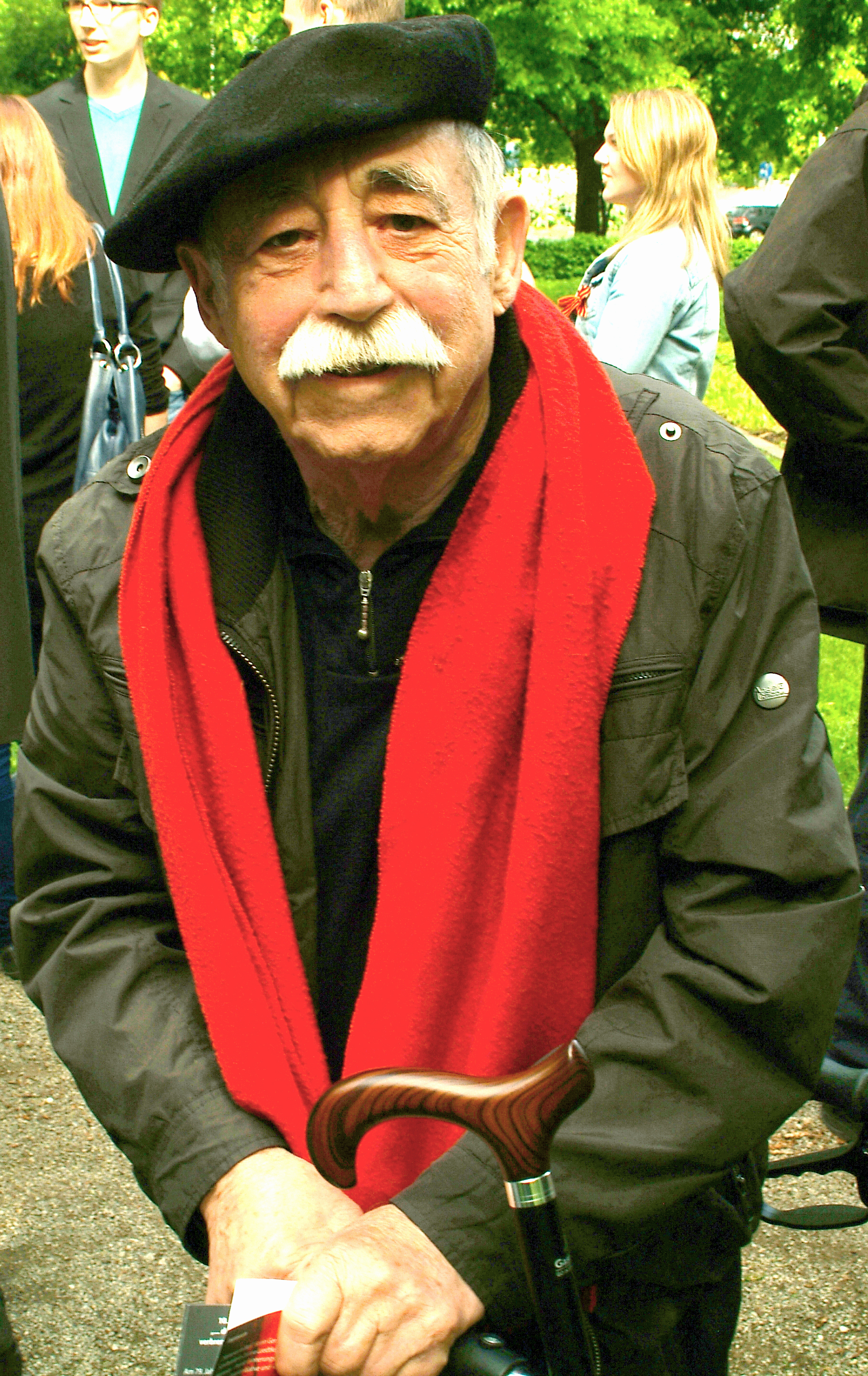 Egon Kuhn, ehemaliger Leiter des Freizeitheim Lindens in Hannover auf dem Ehrenfriedhof am Maschsee-Nordufer anläßlich der Übergabe des Gedenbuches Ehrenfriedhof Maschsee.